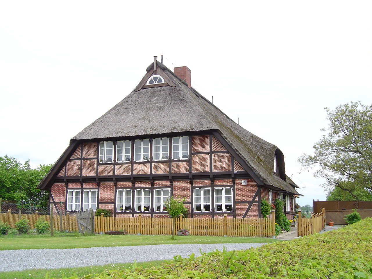 dat niegere Rieck'sche Huus in Corslack